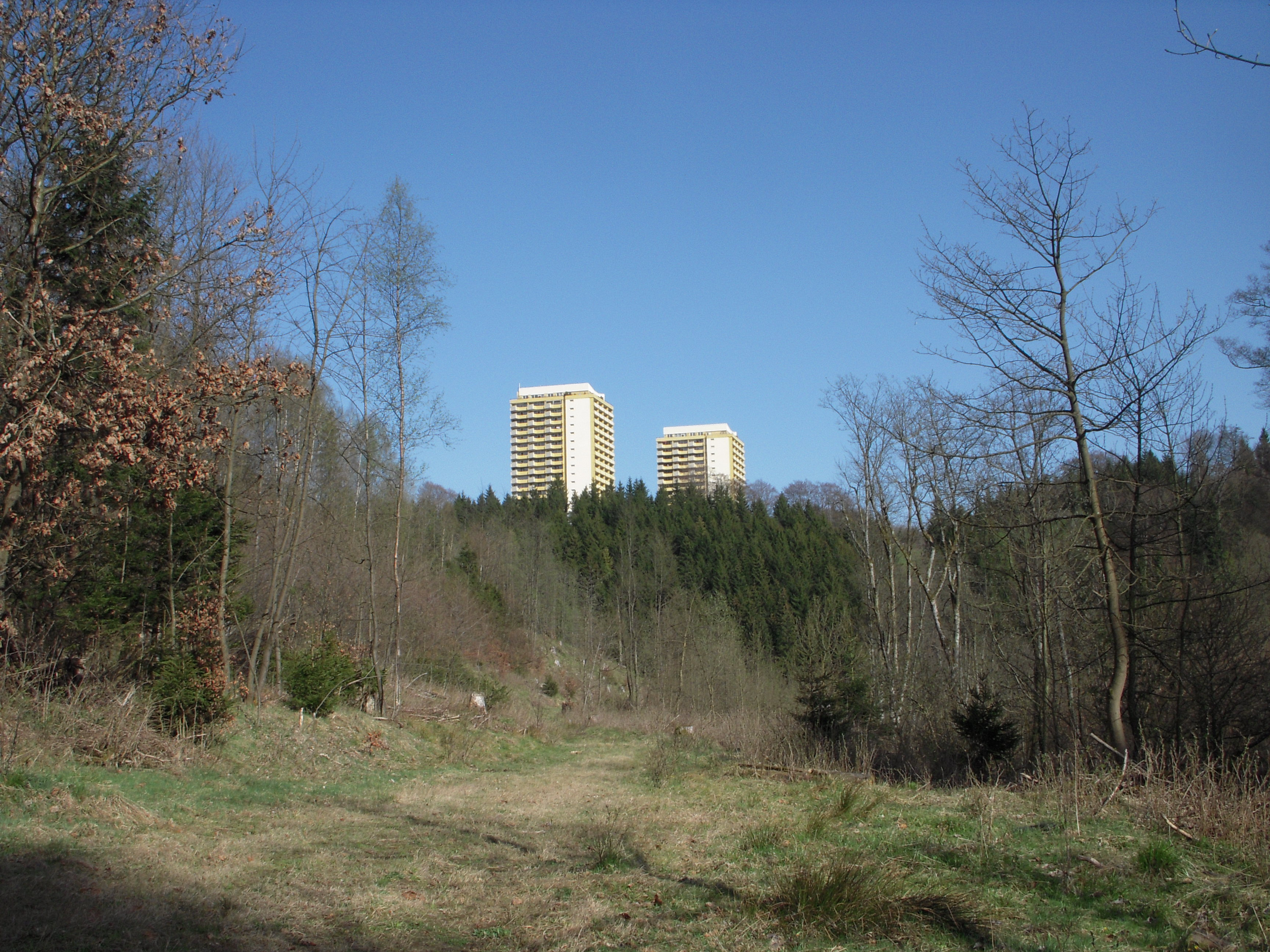 Hohegeiss Panoramic, højhusene der rummer ferielejligheder midt i Harzen